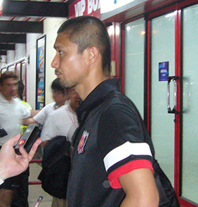 Keisuke Tsuboi